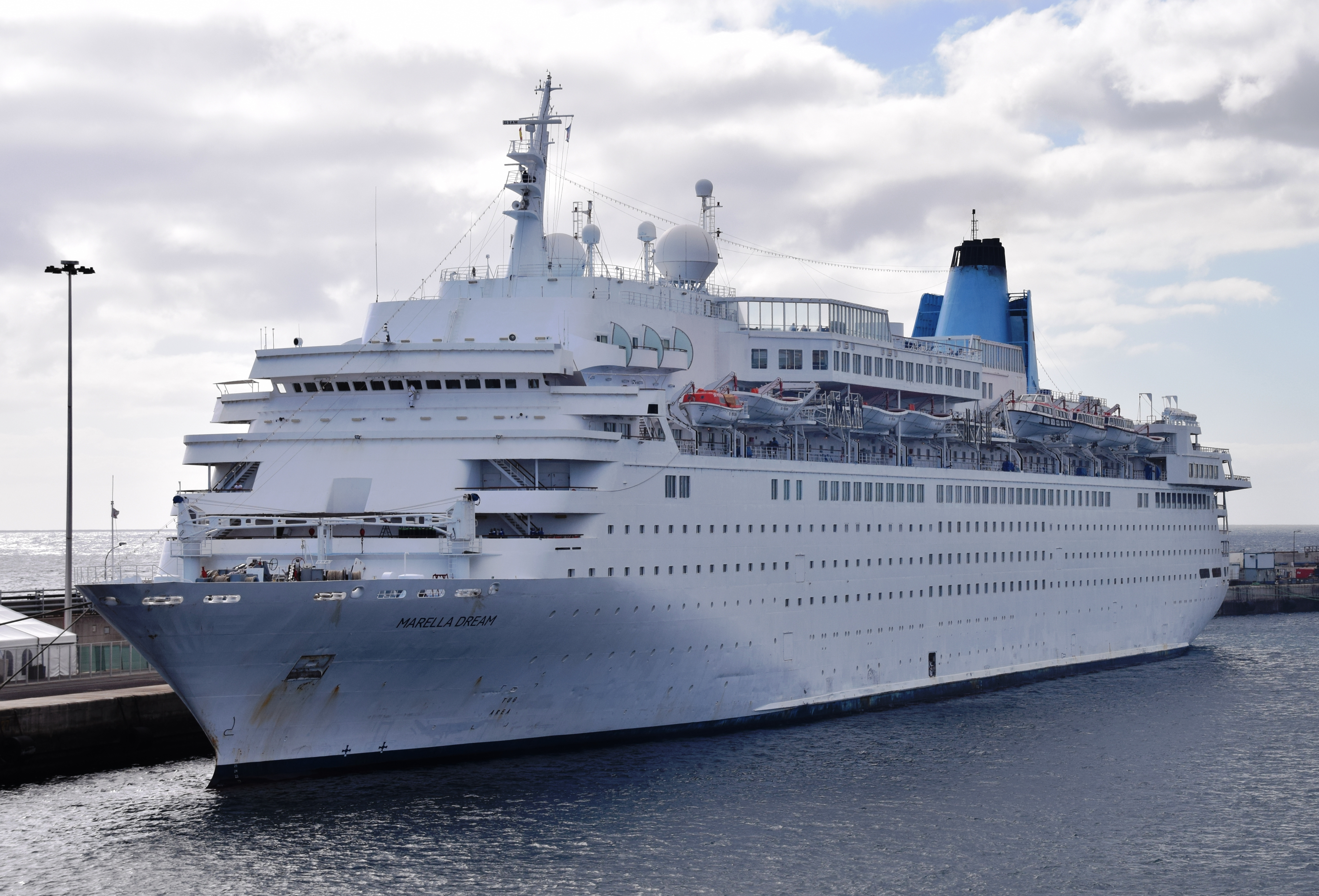 Cruise schip Marella Dream IMO 8407735